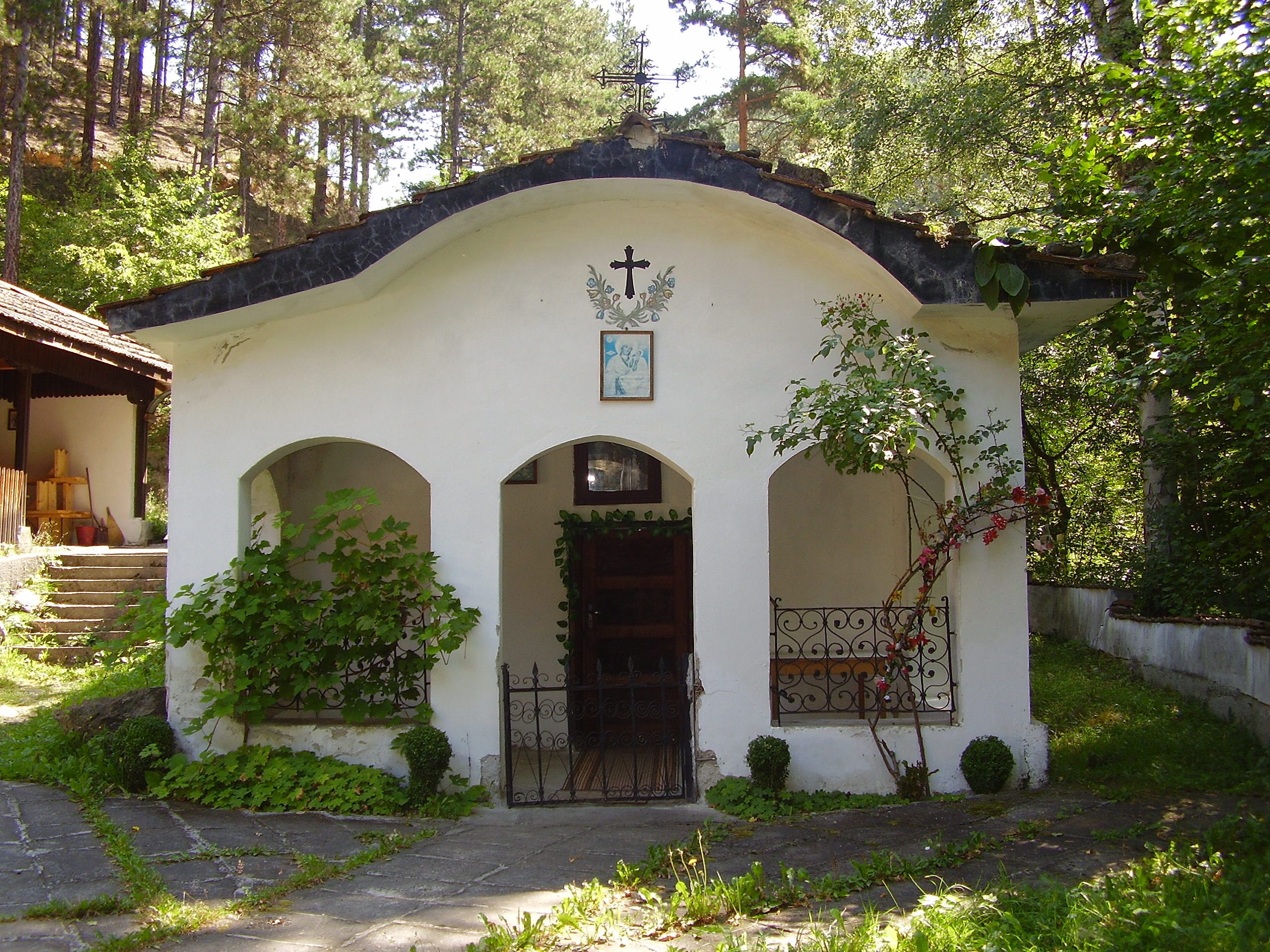 Средновековна църква "Свети Архангел Михаил" - с.Сапарево, общ.Сапарева баня